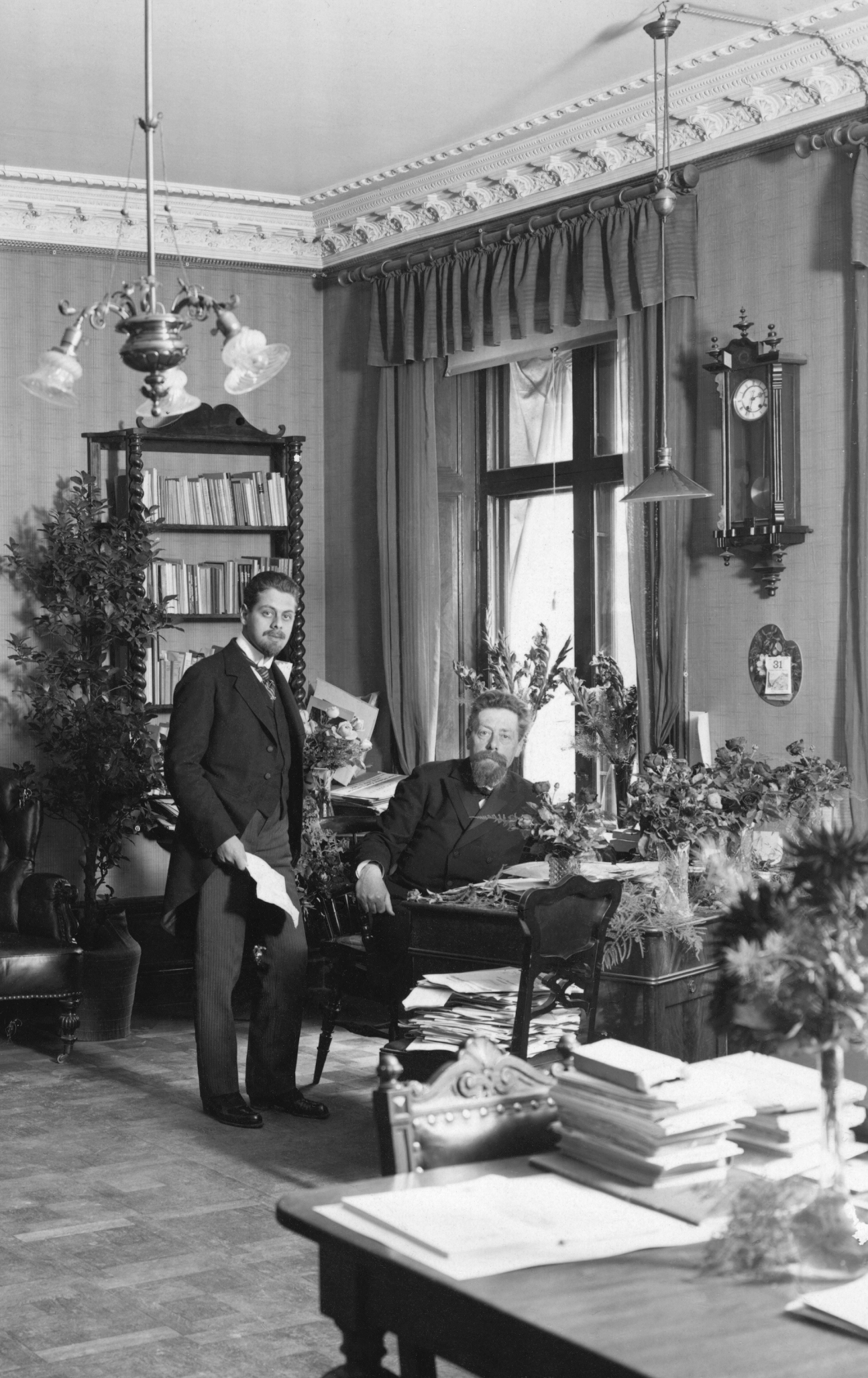 Tor och Karl Otto Bonnier på förlagets sjuttiofemårsdag 30 oktober 1912